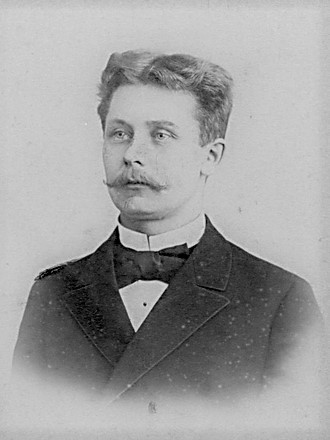 Ado Tõllasepp